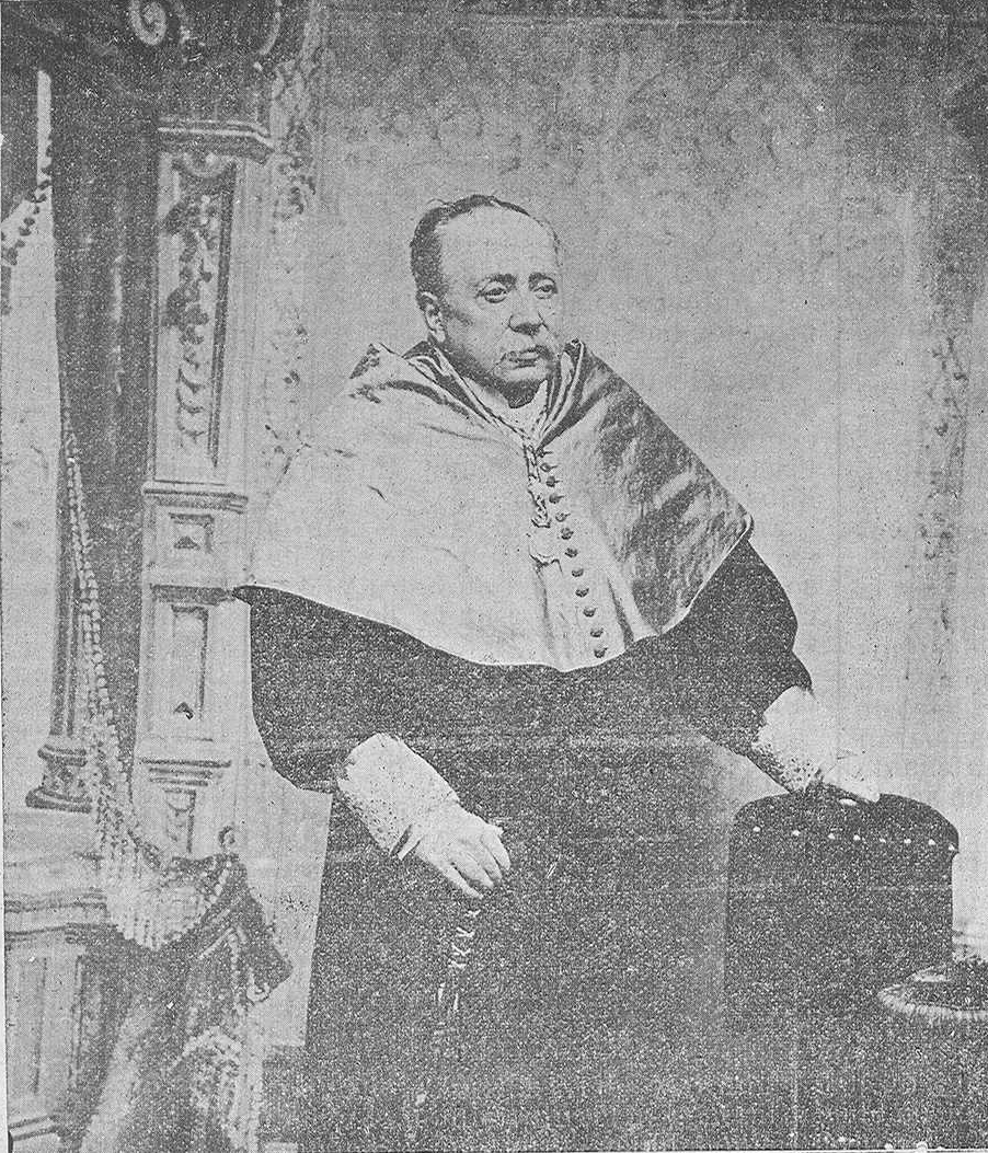 Retrato de Luis Rodríguez Seoane, publicado en El Eco de Santiago.